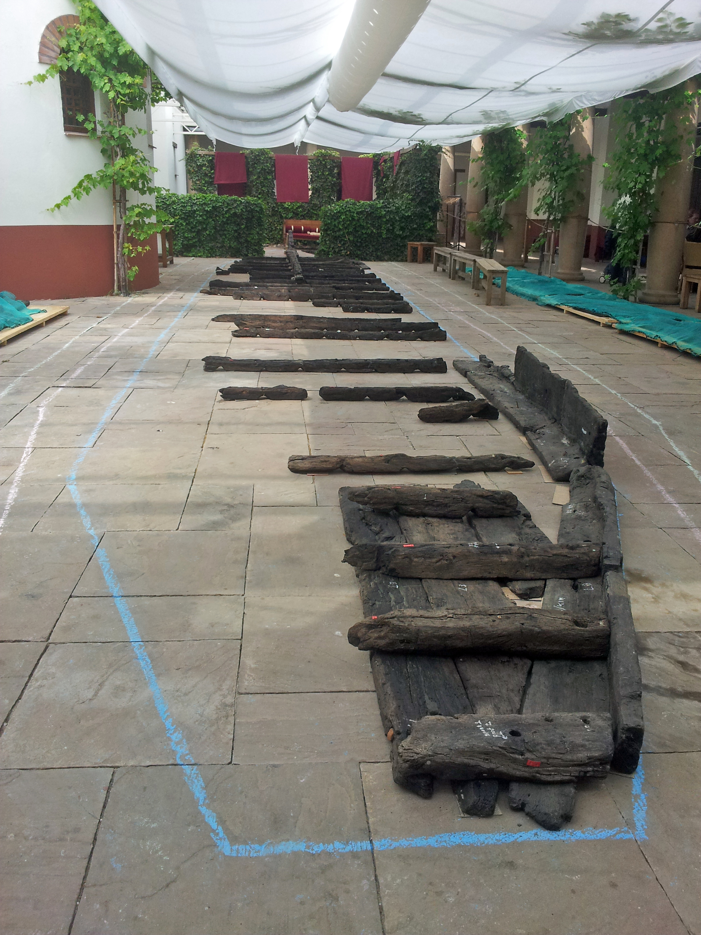 Onderdelen van het Romeinse vrachtschip Zwammerdam 2, uitgelegd in de tijdelijke restauratiewerf in het Archeon, presentatie 18 mei 2017. De platbodem is opgegraven in 1972 in Zwammerdam bij het Romeinse castellum Nigrum Pullum. De Zwammerdam 2 is de naamgever van het type Zwammerdam. Het vrachtschip is bijna 23 meter lang en werd gebouwd rond 205 na Chr.